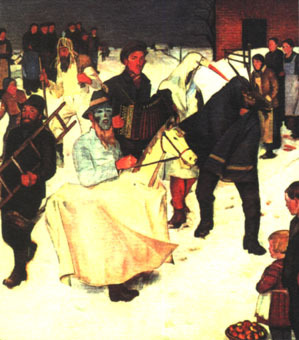 Словинцы. Рождество